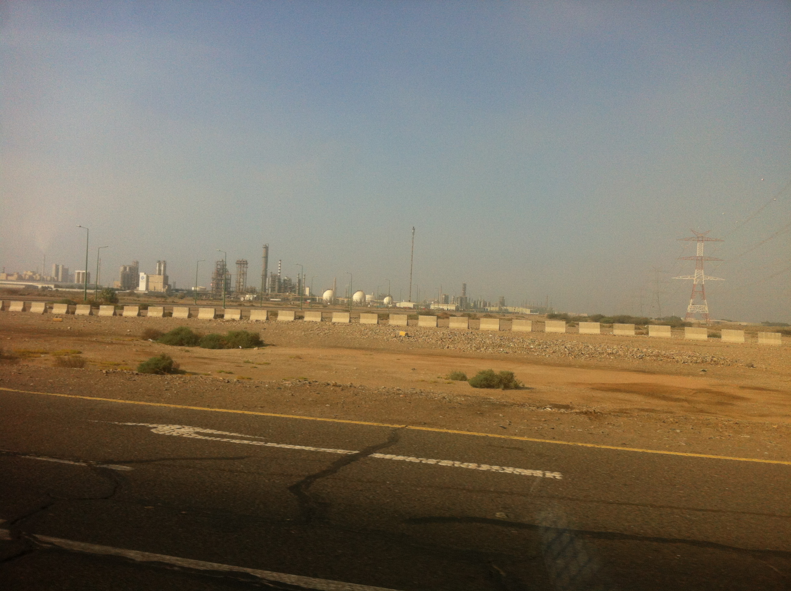 ابن رشد